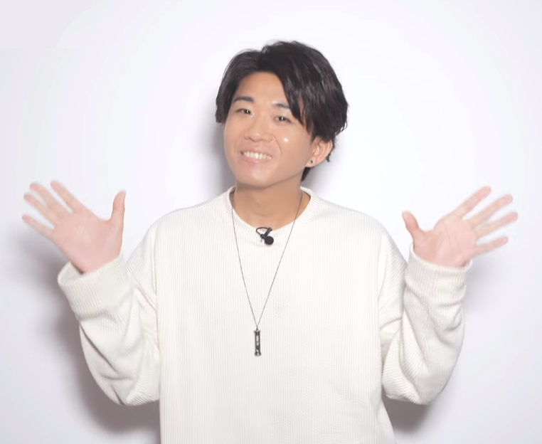 渡辺紘（声優）